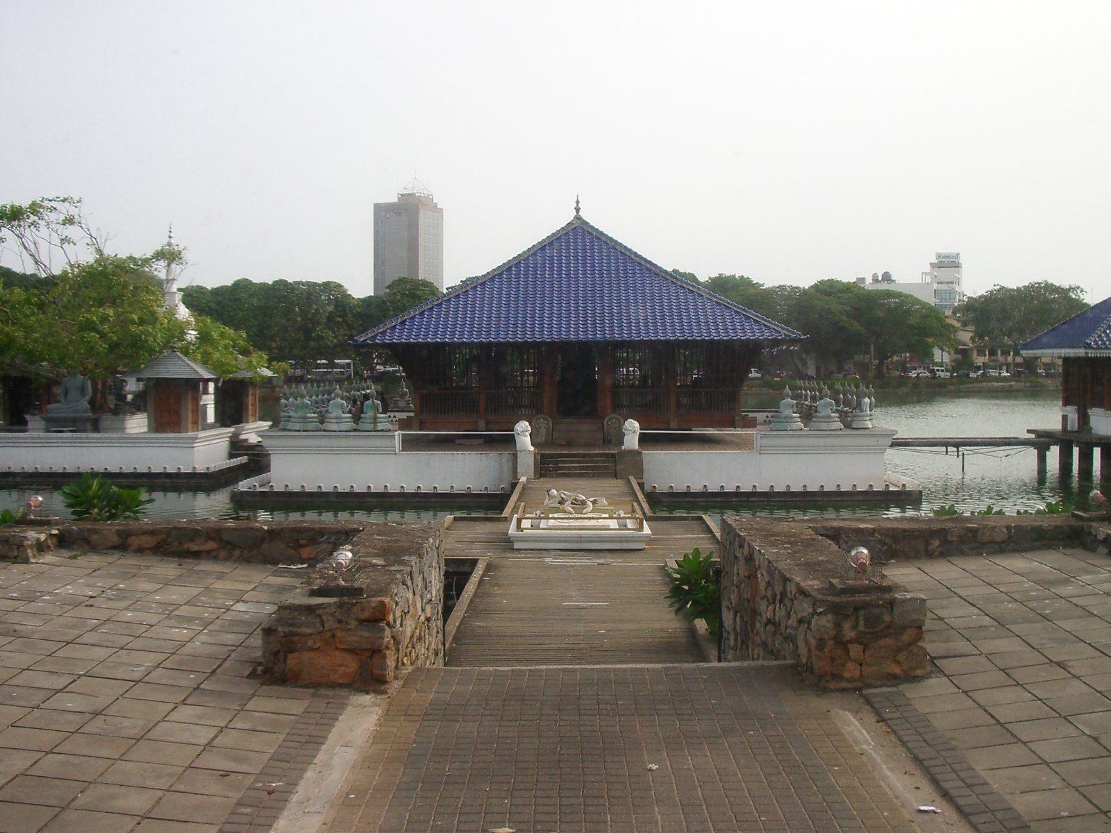 Temple a Colombo, imatge feta per J. Olle el juliol del 2006